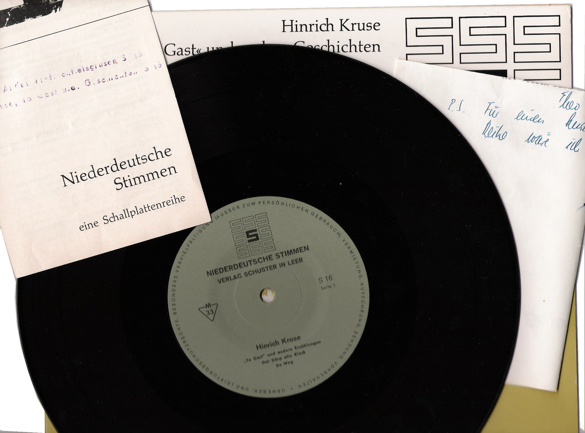 SCHULEER